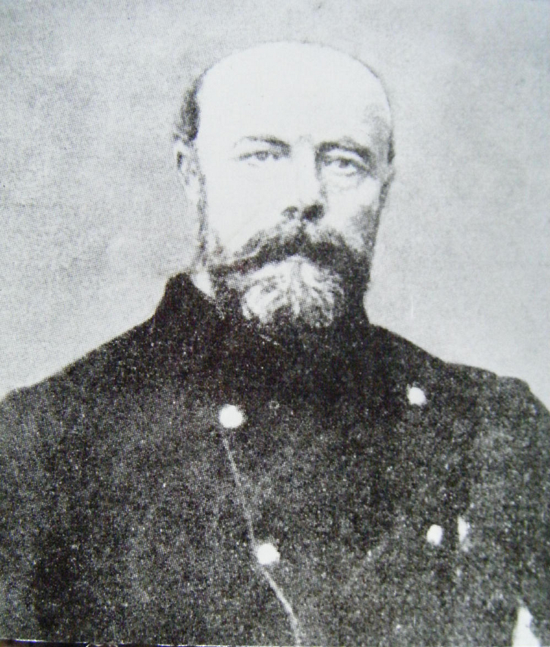 Capitán Felipe Caronti.